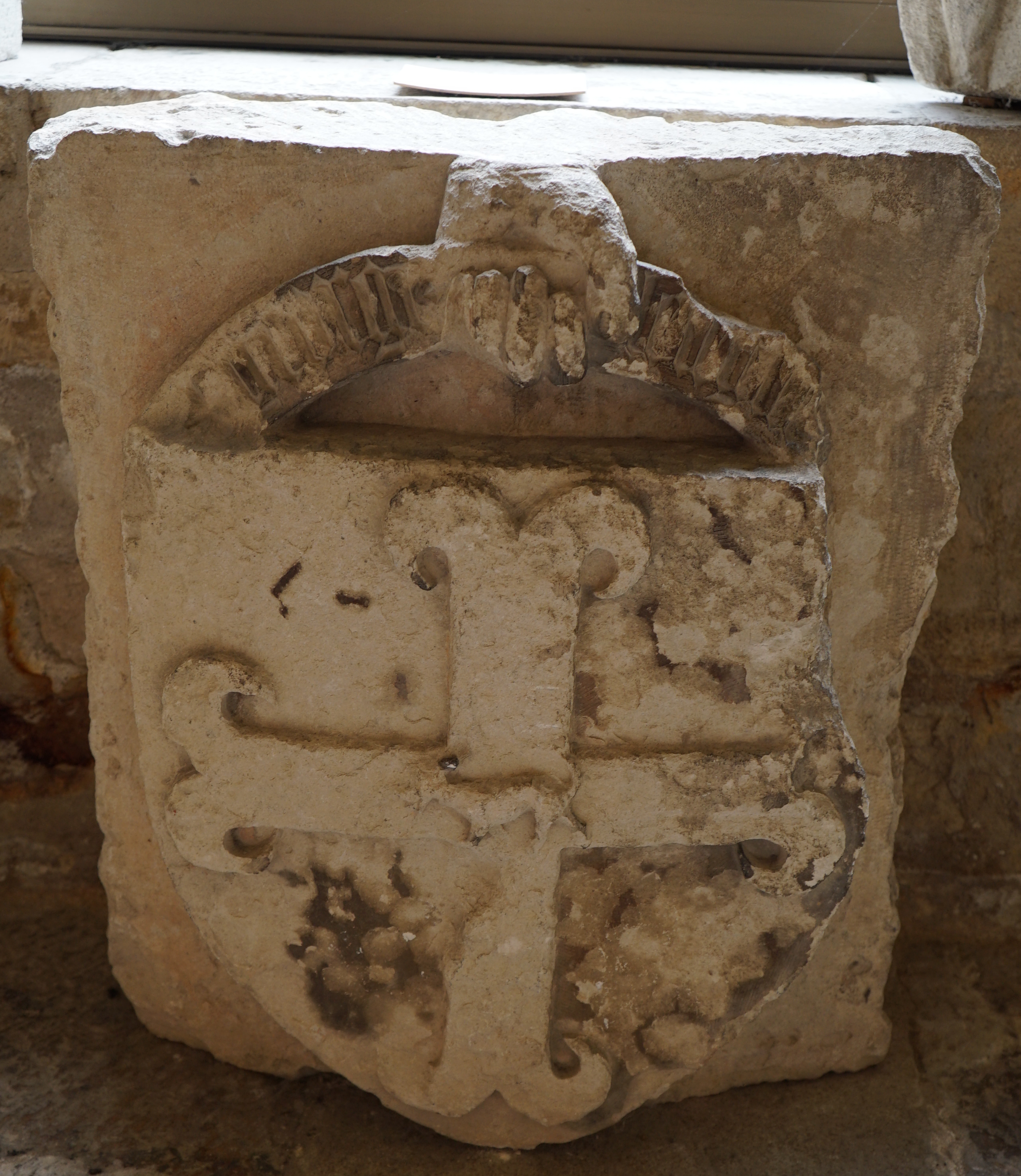 blason de Warric de Dommartin provenant de la façade de la cathédrale st-Etienne, présenté au musée de Toul.